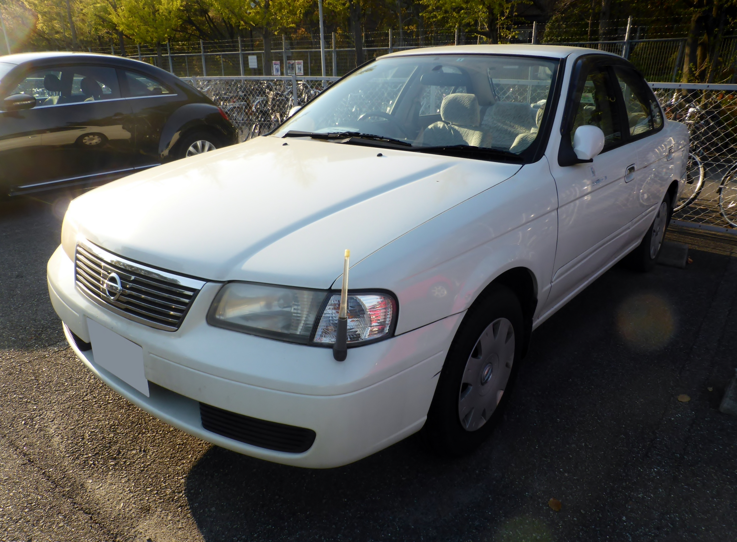 B15型日産・サニー1500EXサルーンをフロントから撮影。